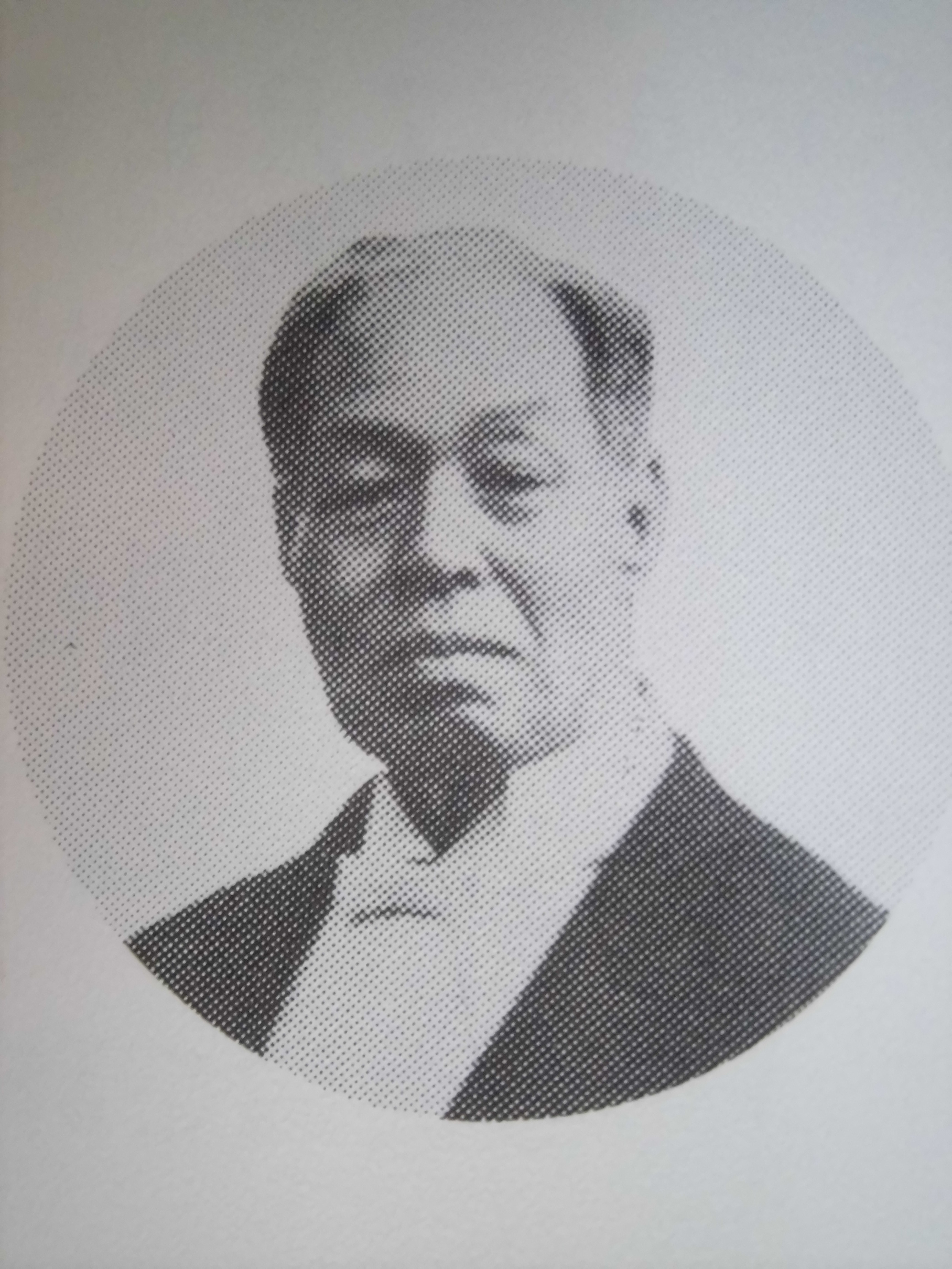 初代坂口平兵衛（Sakaguchi Heibei1）